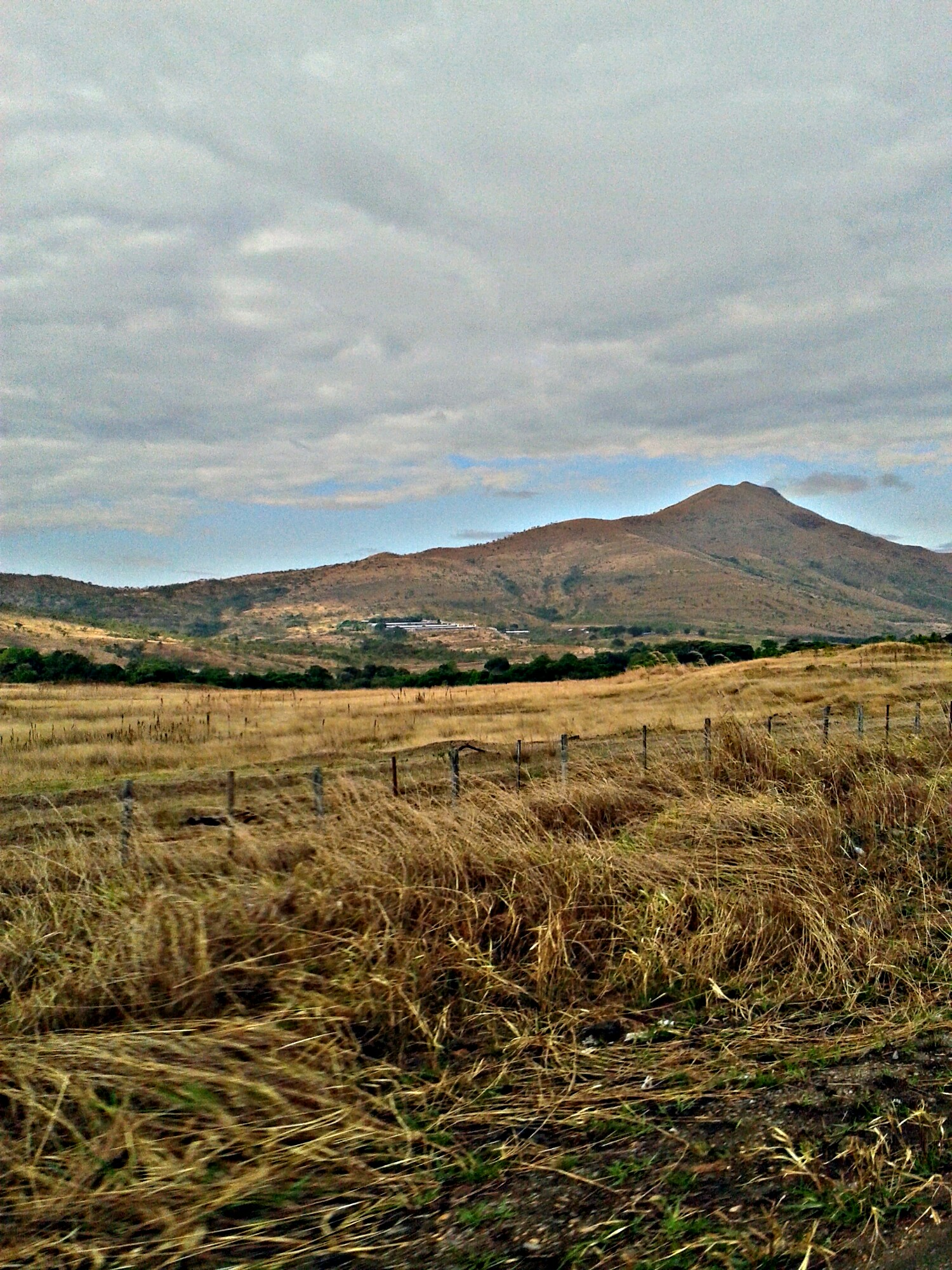 Cerro Las Tetas, 1100 m.s.n.m., Tinaquillo